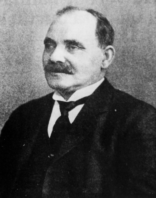 Føroyskt: Andrass Samuelsen (1873–1954), løgmaður í Føroyum 1948–1950.